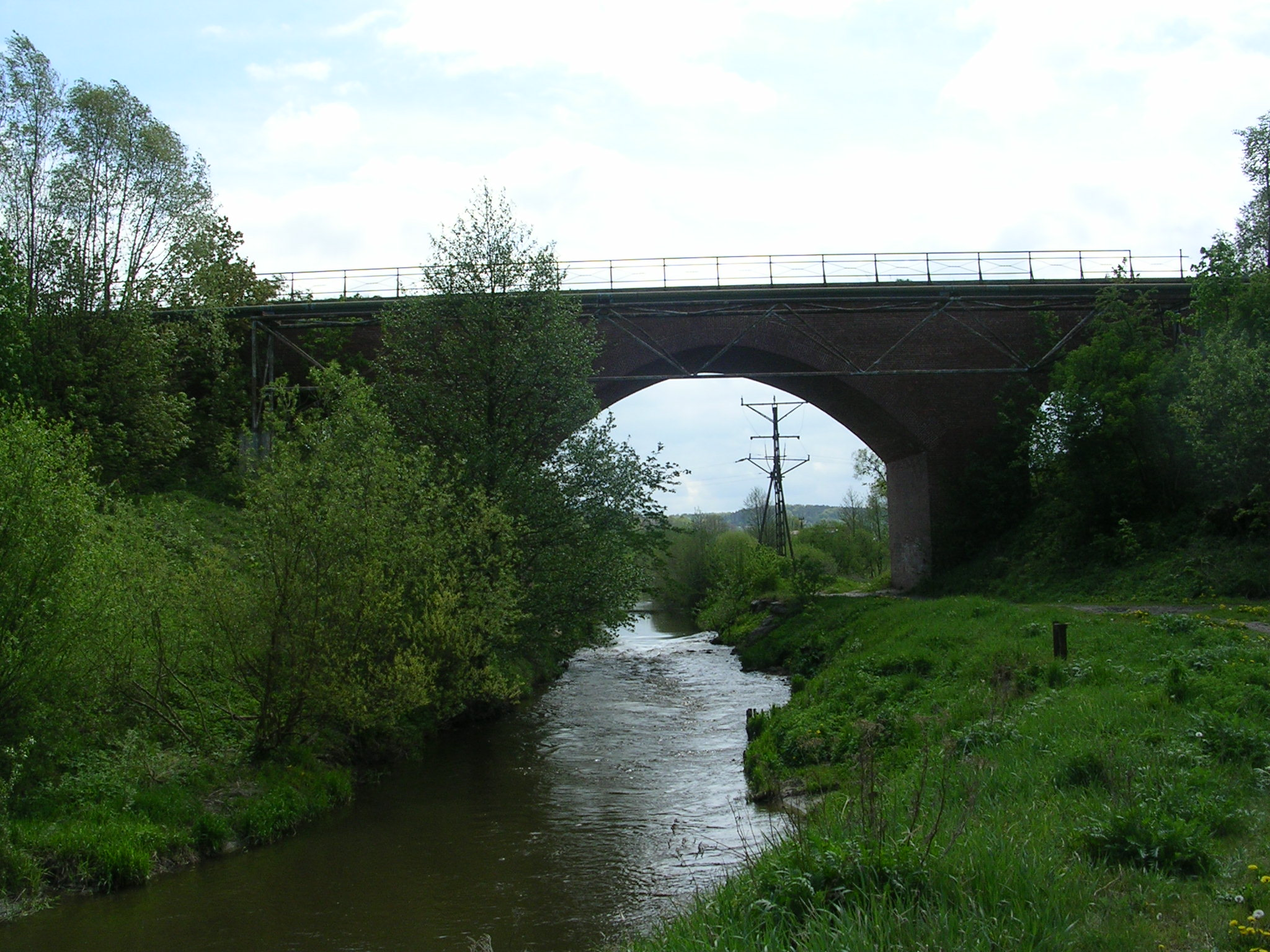 Liwa niedaleko Kwidzyna, Poland